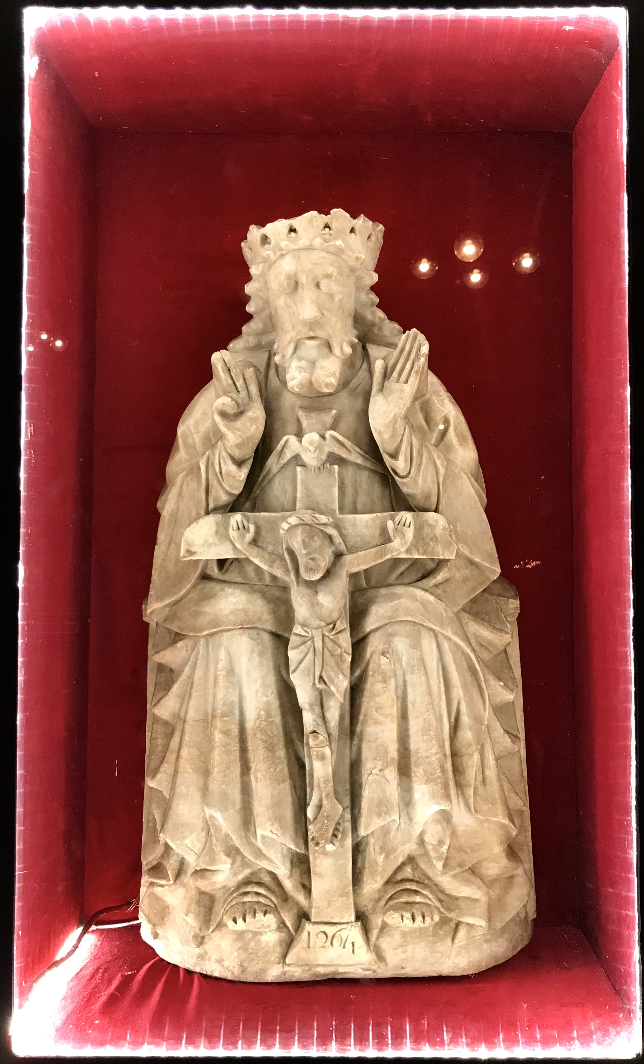 Escultura de la Trinitat situada a Black Abbey, a Kilkenny, datada del 1264.